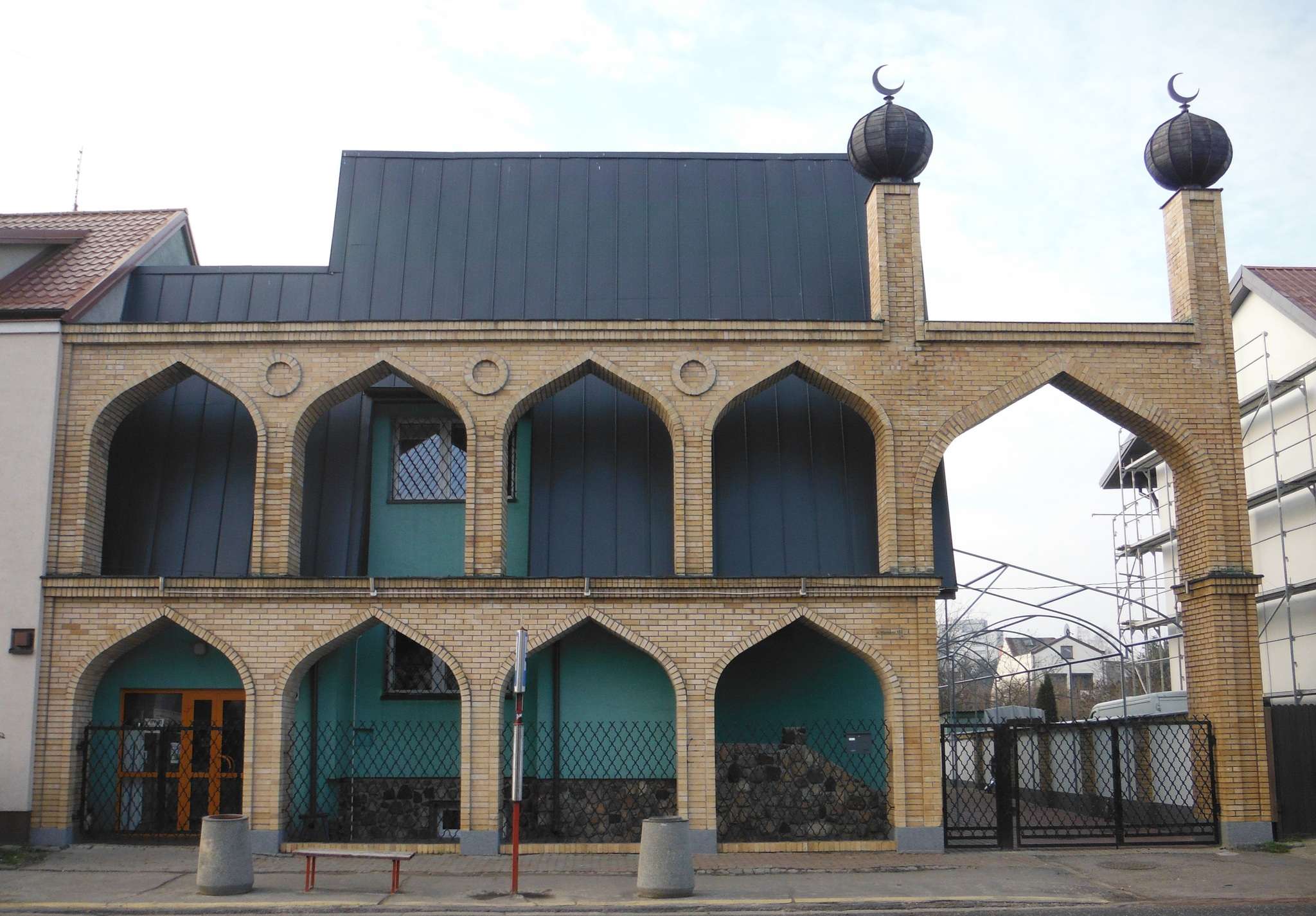 Meczet przy ul. Wiertniczej 103 w Warszawie.